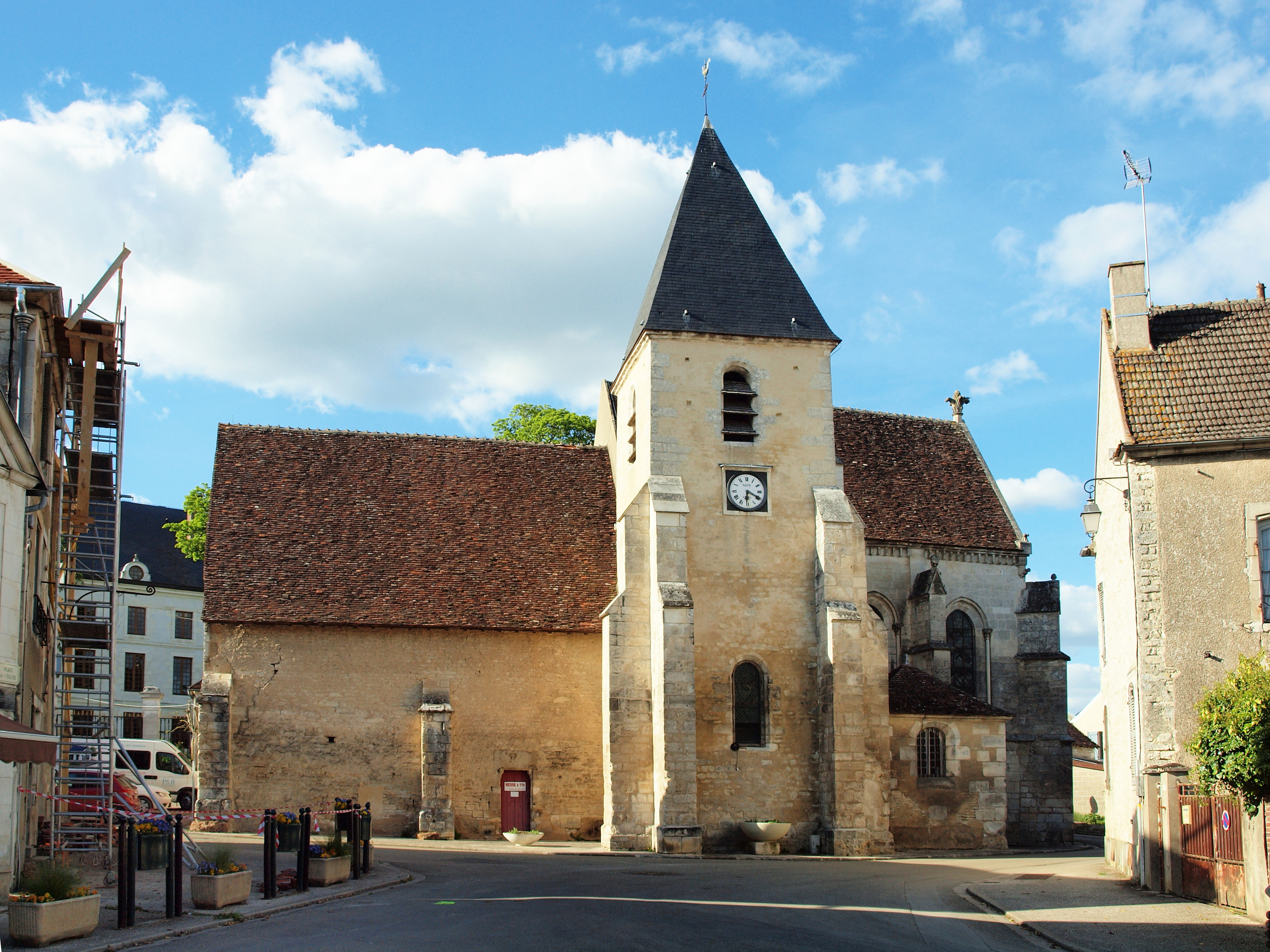 Val-de-Mercy (Yonne, France)